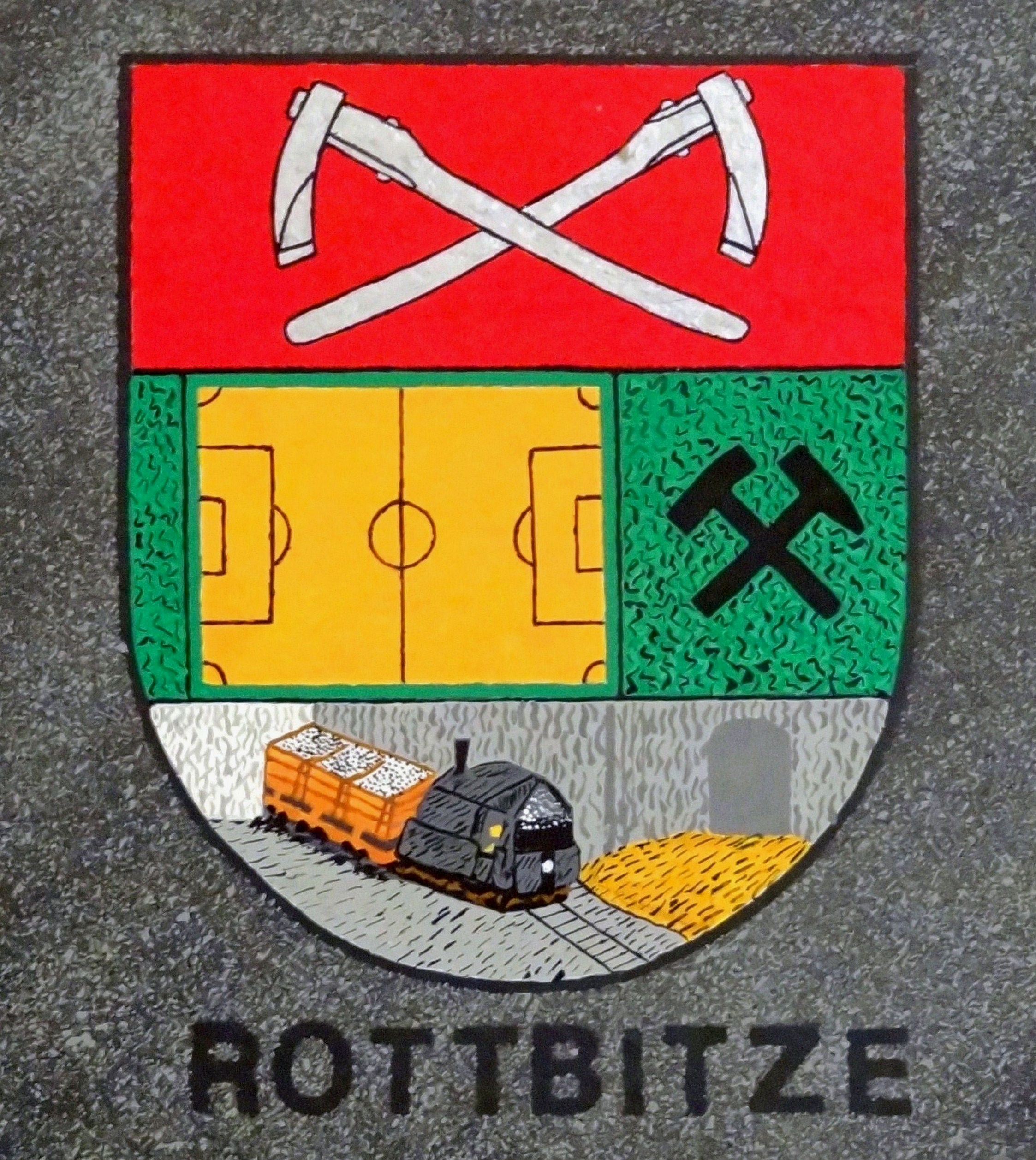 Schiefertafel als Ortswappen von Rottbitze, erstellt von Richard Lenzgen